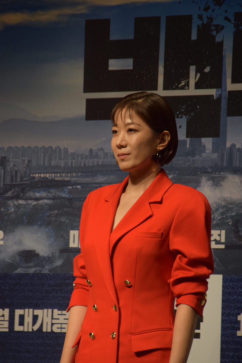 영화 '백두산' Mount Paektu 제작보고회 현장 (2019.11.19)